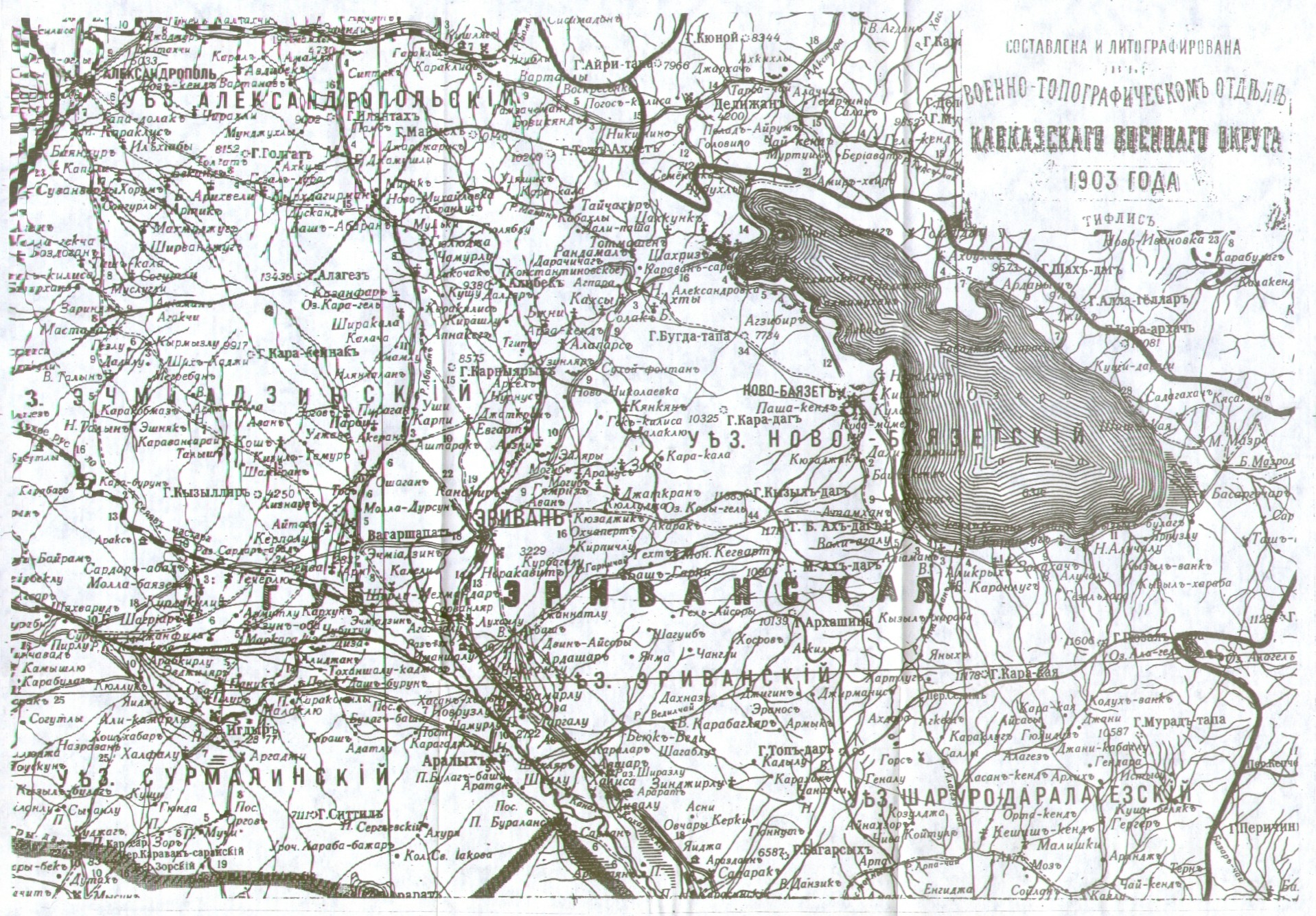 Эриванская губерния